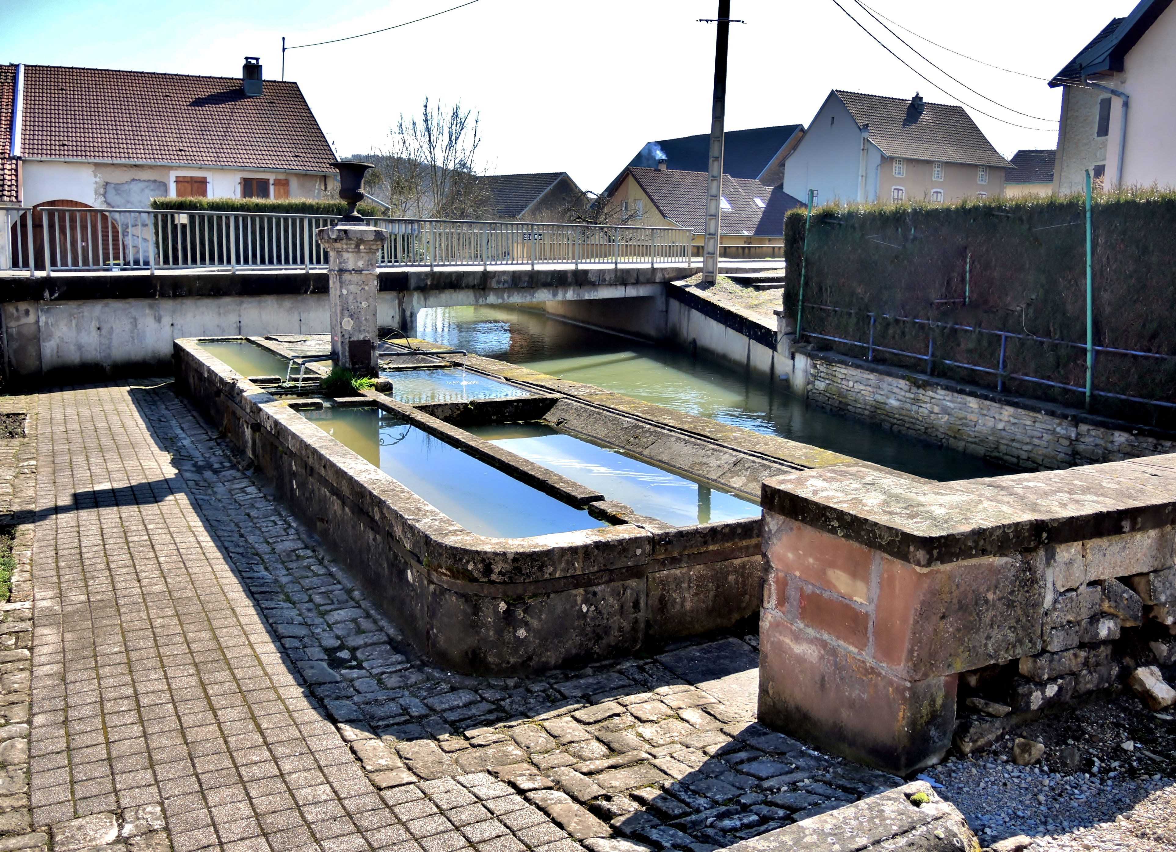 Lavoir dans le village d'Aibre. Doubs